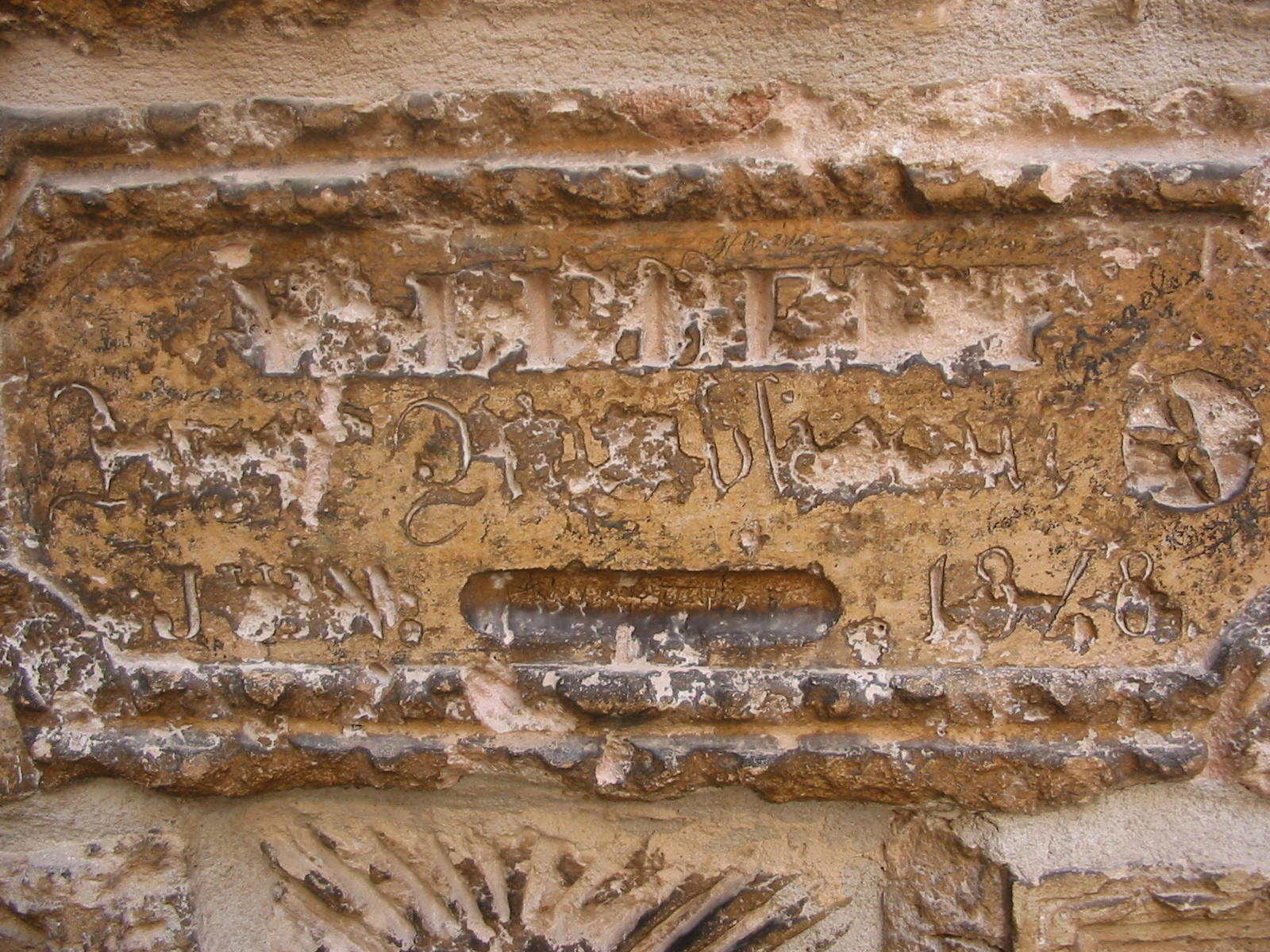 Le nom d'un prisonnier politique de 1848 au château d'If